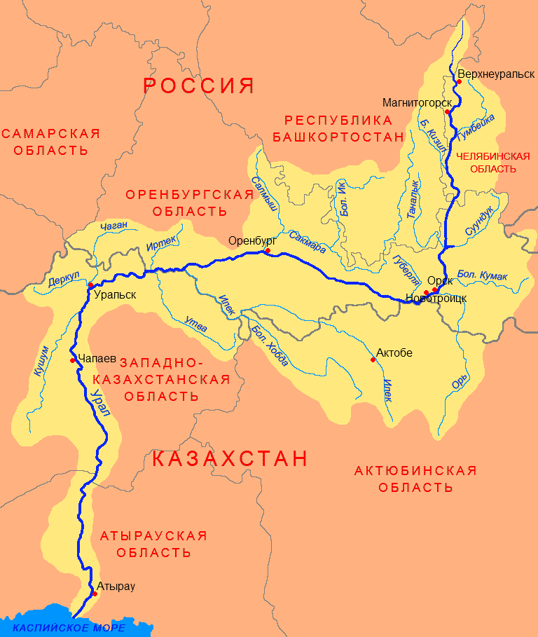 Схема бассейна реки Урал